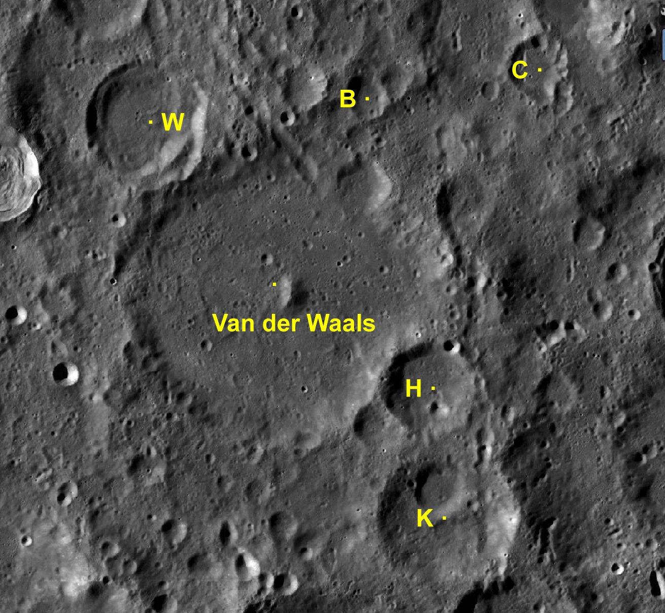 Cráter lunar Van der Waals. Cráteres satélite. (Imagen LRO)